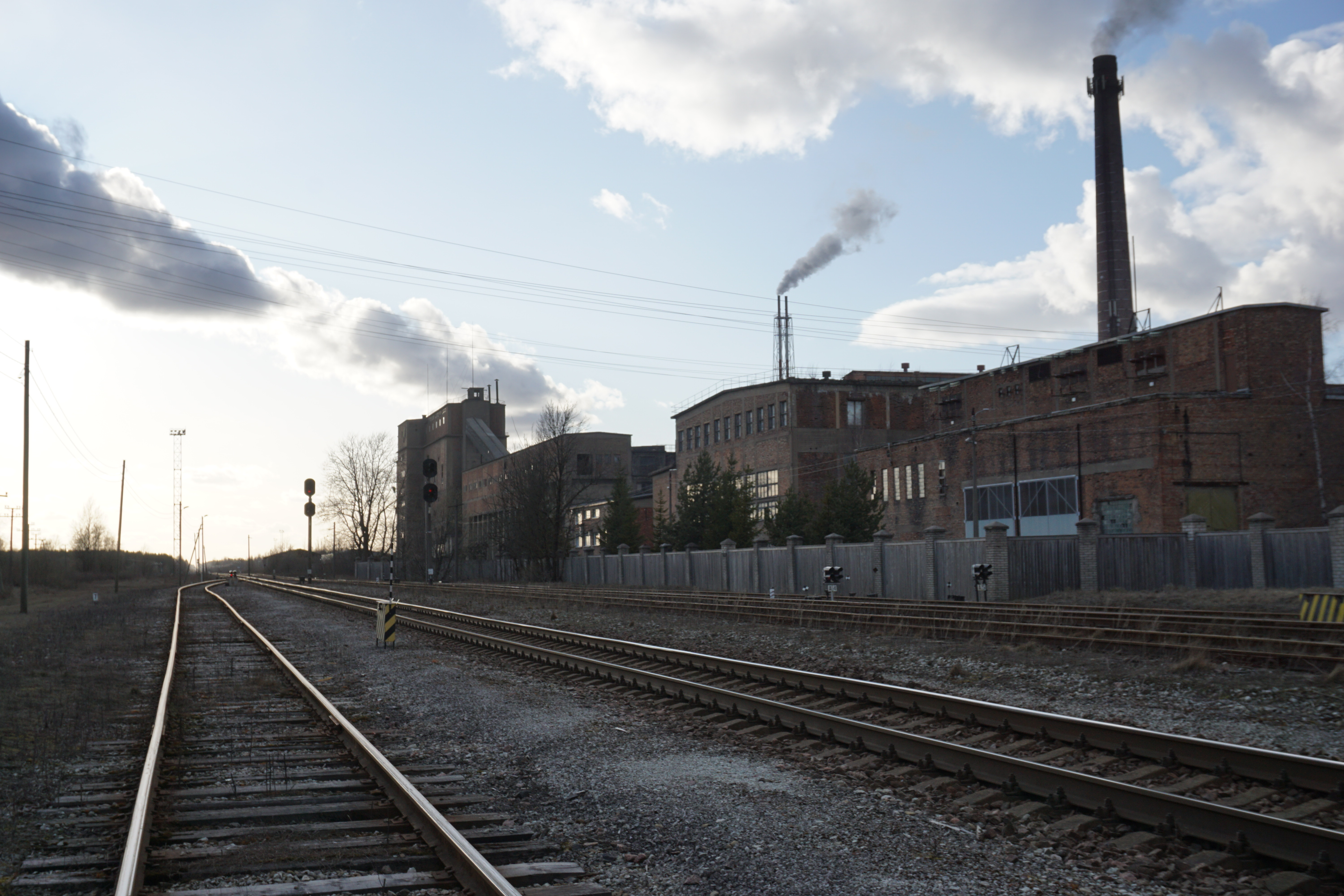 Tehasehoone Kiviõli jaama juures